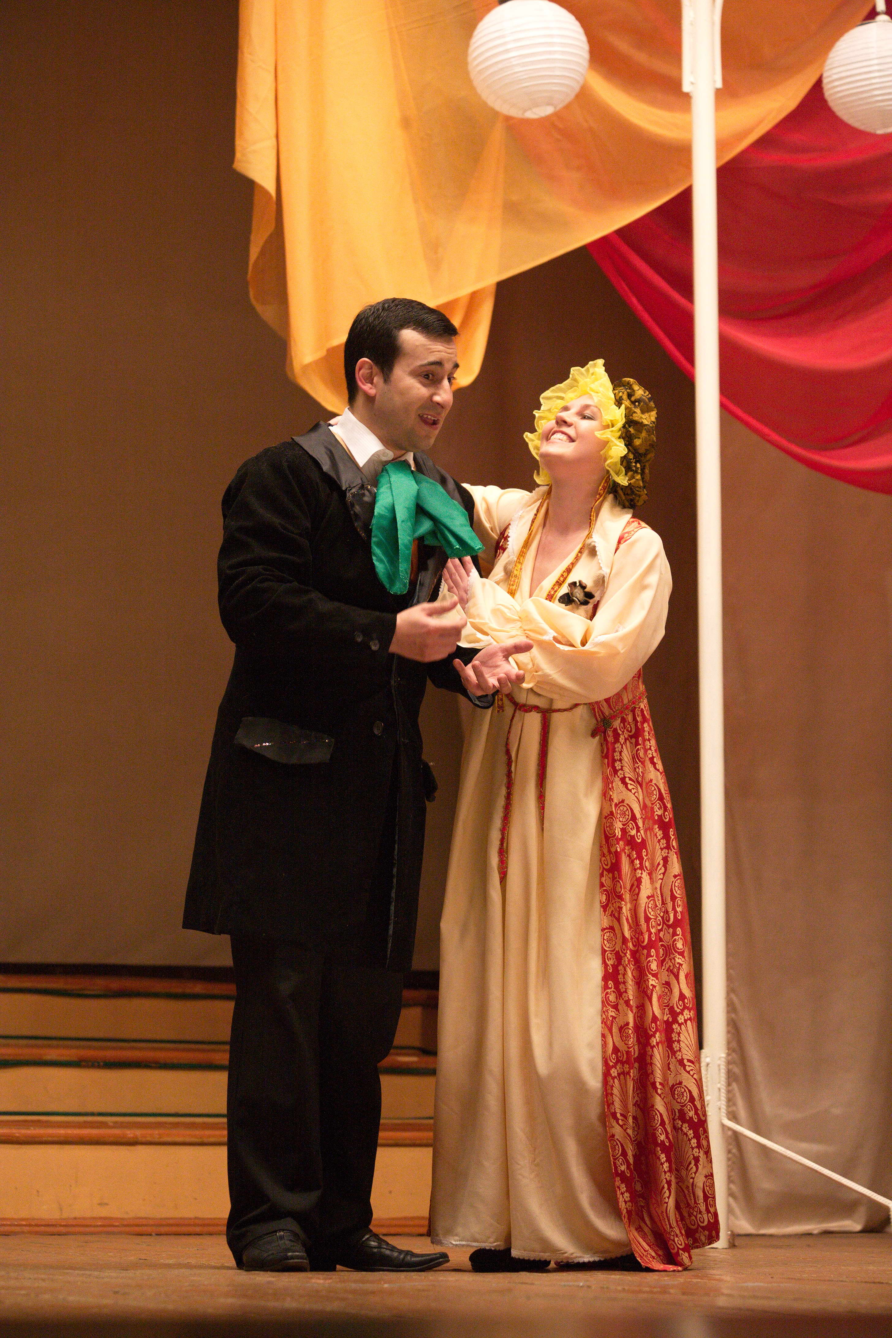 спектакль "Двое" 2011 г.